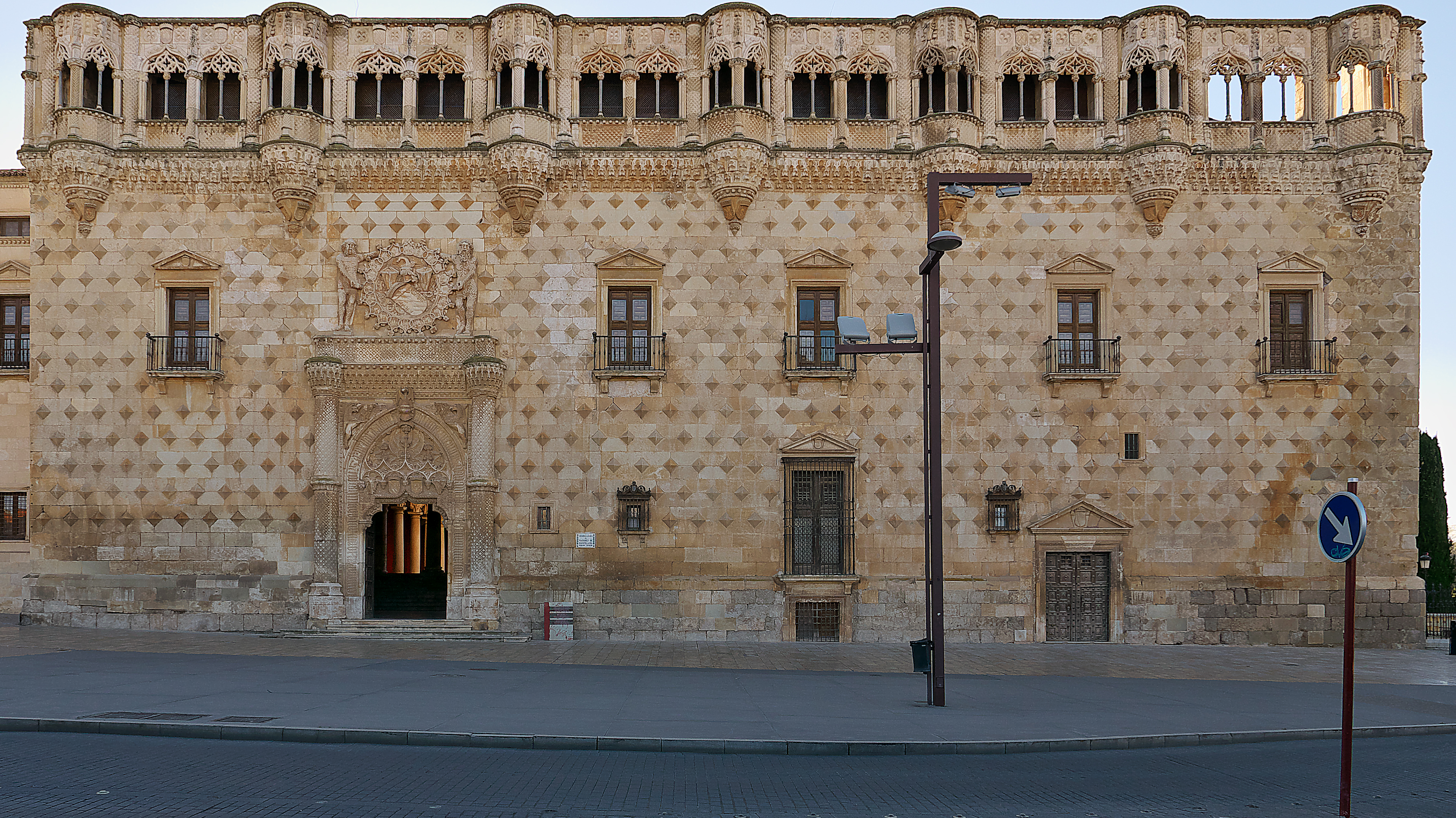 Íñigo López de Mendoza y de la Vega, II Duque del Infantado, encarga a Juan Guas, maestro de la Casa de Mendoza, la construcción de su palacio en Guadalajara (1482), que sería elegido por Felipe II para celebrar su boda con Isabel de Valois.